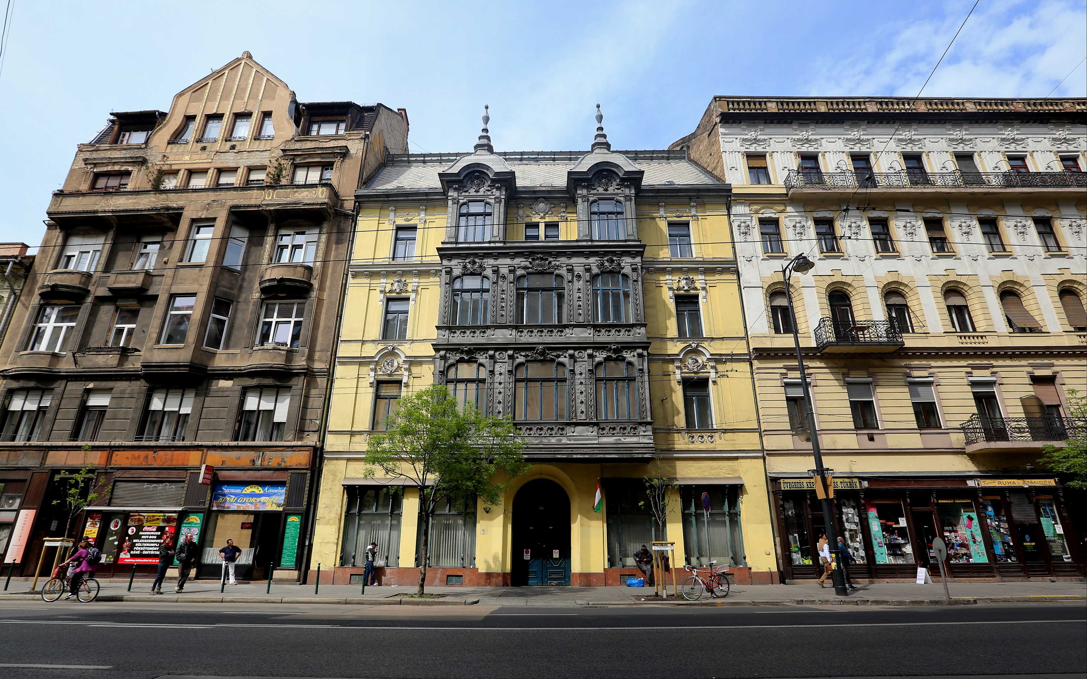 VIII. ker., Baross utca 74-76-78?